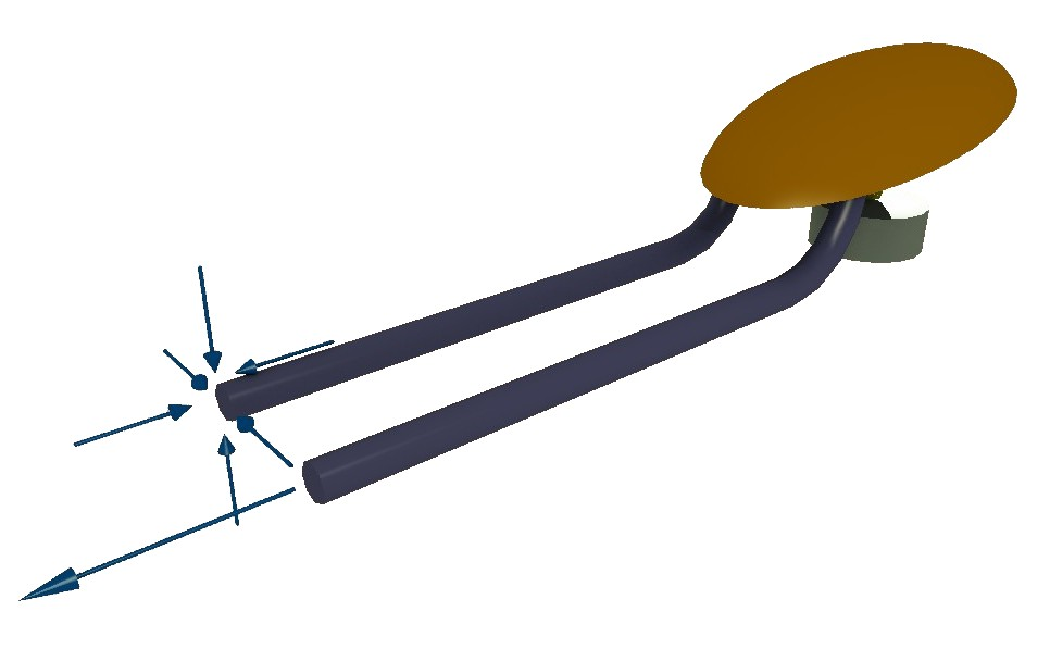 Knatterboot Heck